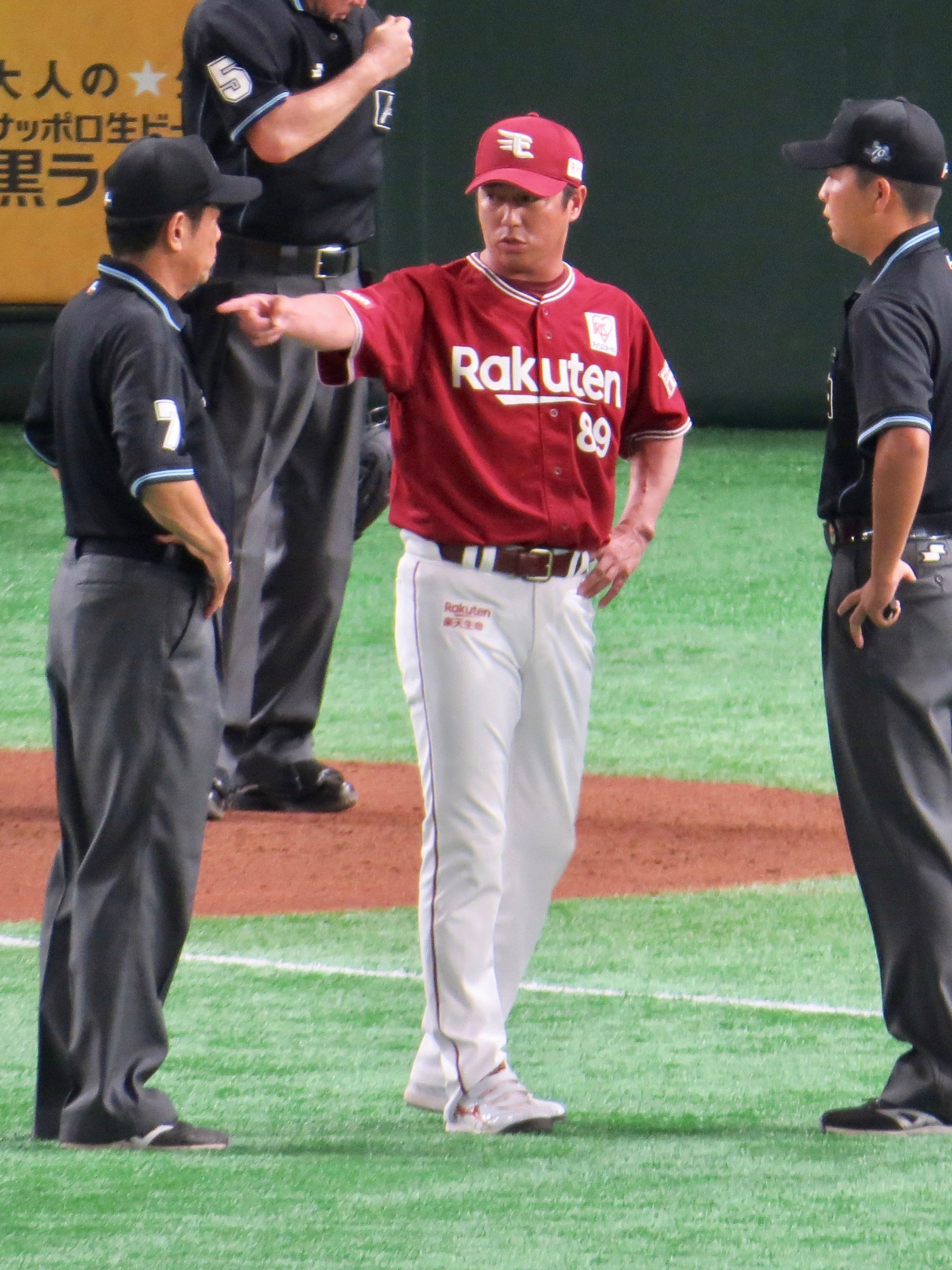 東北楽天ゴールデンイーグルスの監督「平石洋介」。東京ドームにて。